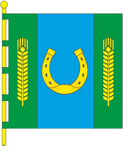 Прапор села Плоске (Балтський район)